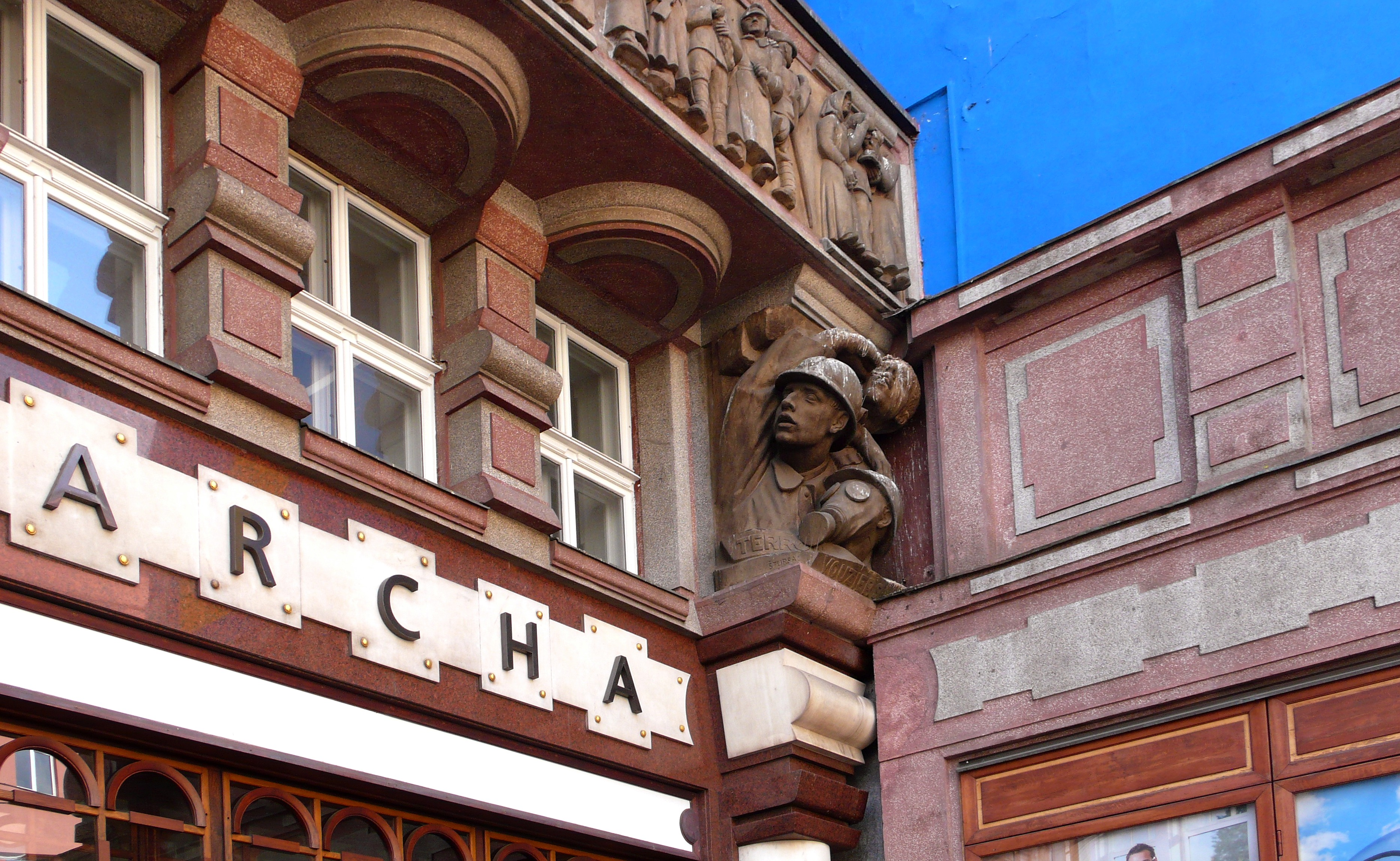 Banco de la Legión de Checoslovaquia (1921-1923). Josef Gočár. Calle Na Poříčí 24. Nové Město